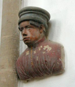 Büste Conrad von Einbecks